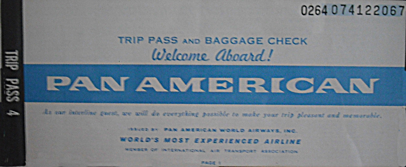 Couverture d'un billet de passage années 60